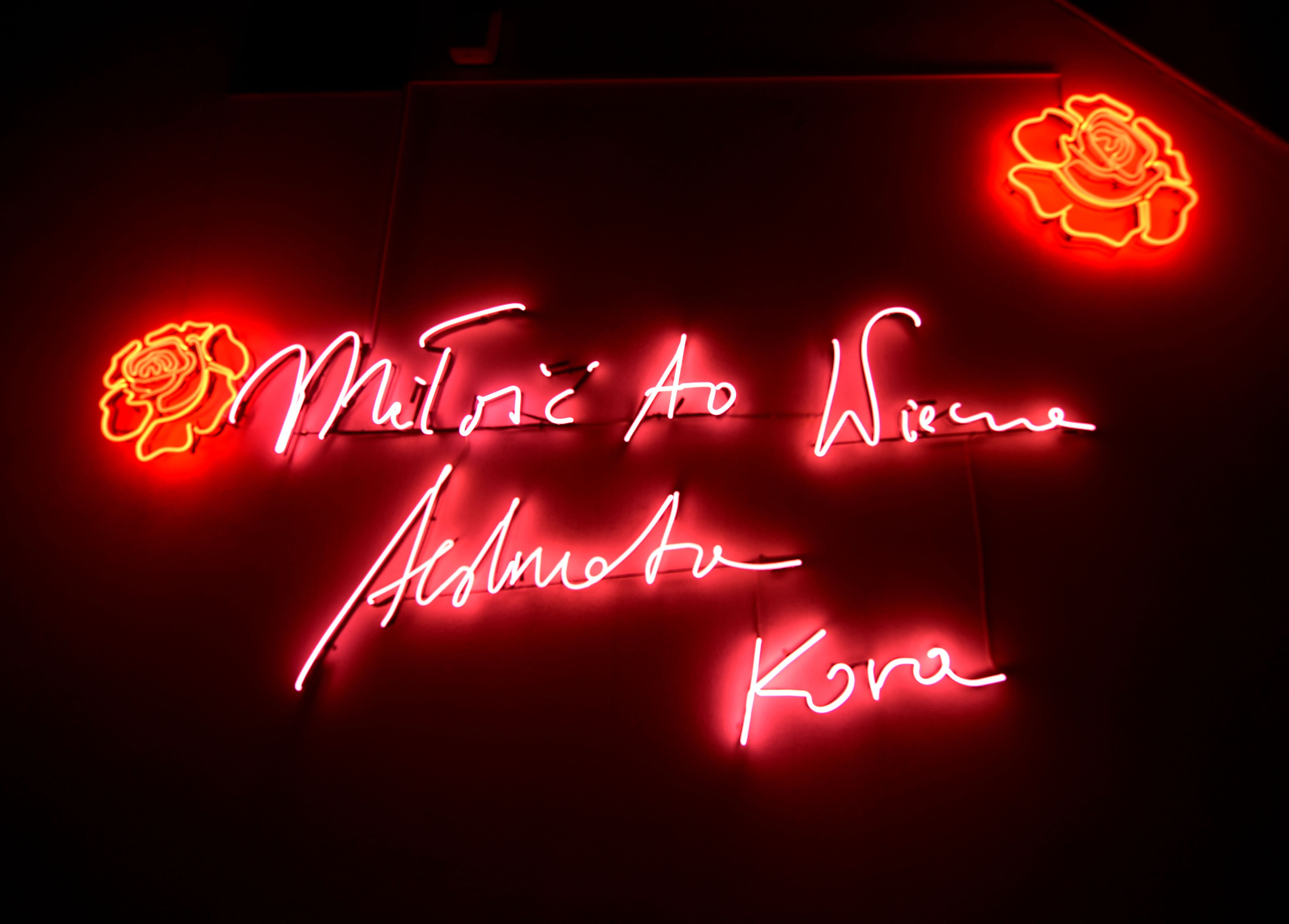 Miłość to wieczna tęsknota. Neon autorstwa Pauliny Ołowskiej upamiętniający Korę na bocznej ścianie domu przy ul. Płatniczej 59 w Warszawie